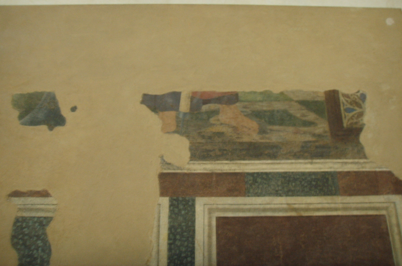 Andrea del Castagno, Piero della Francesca, Domenico Veneziano e Alesso Baldovinetti, resti di affreschi di S. Egidio con Storie della Vergine